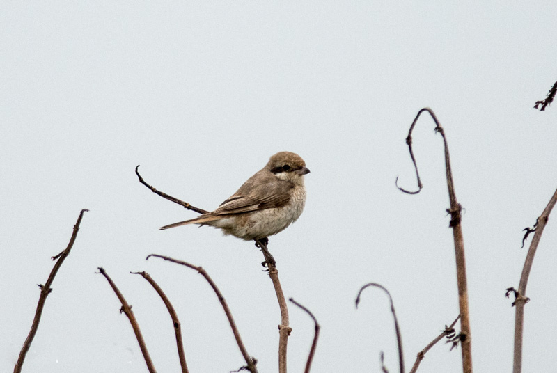 turkestaanse klauwier-1.jpg